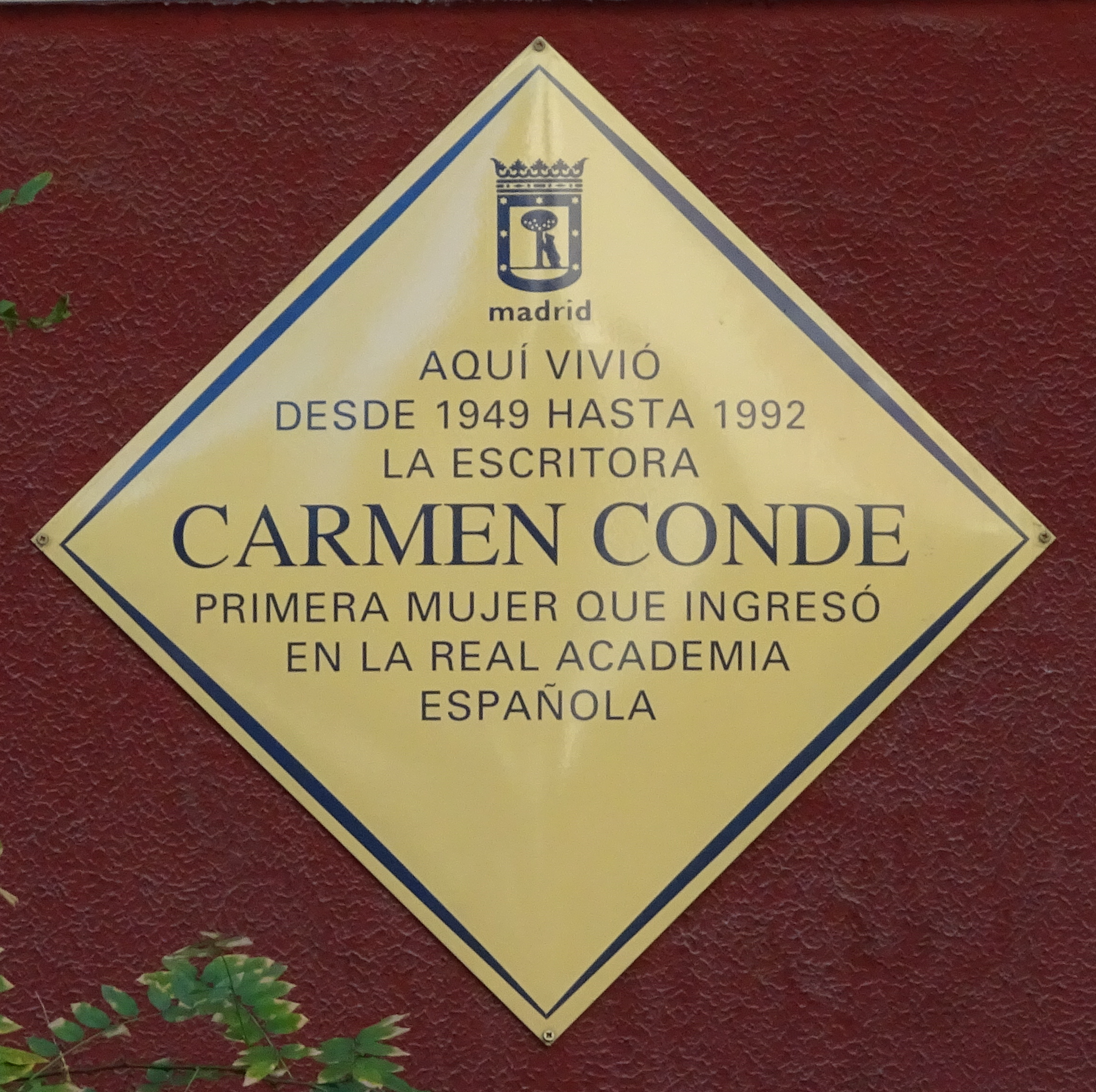 Aquí vivió desde 1949 hasta 1992 la escritora Carmen Conde, primera mujer que ingresó en la Real Academia Española